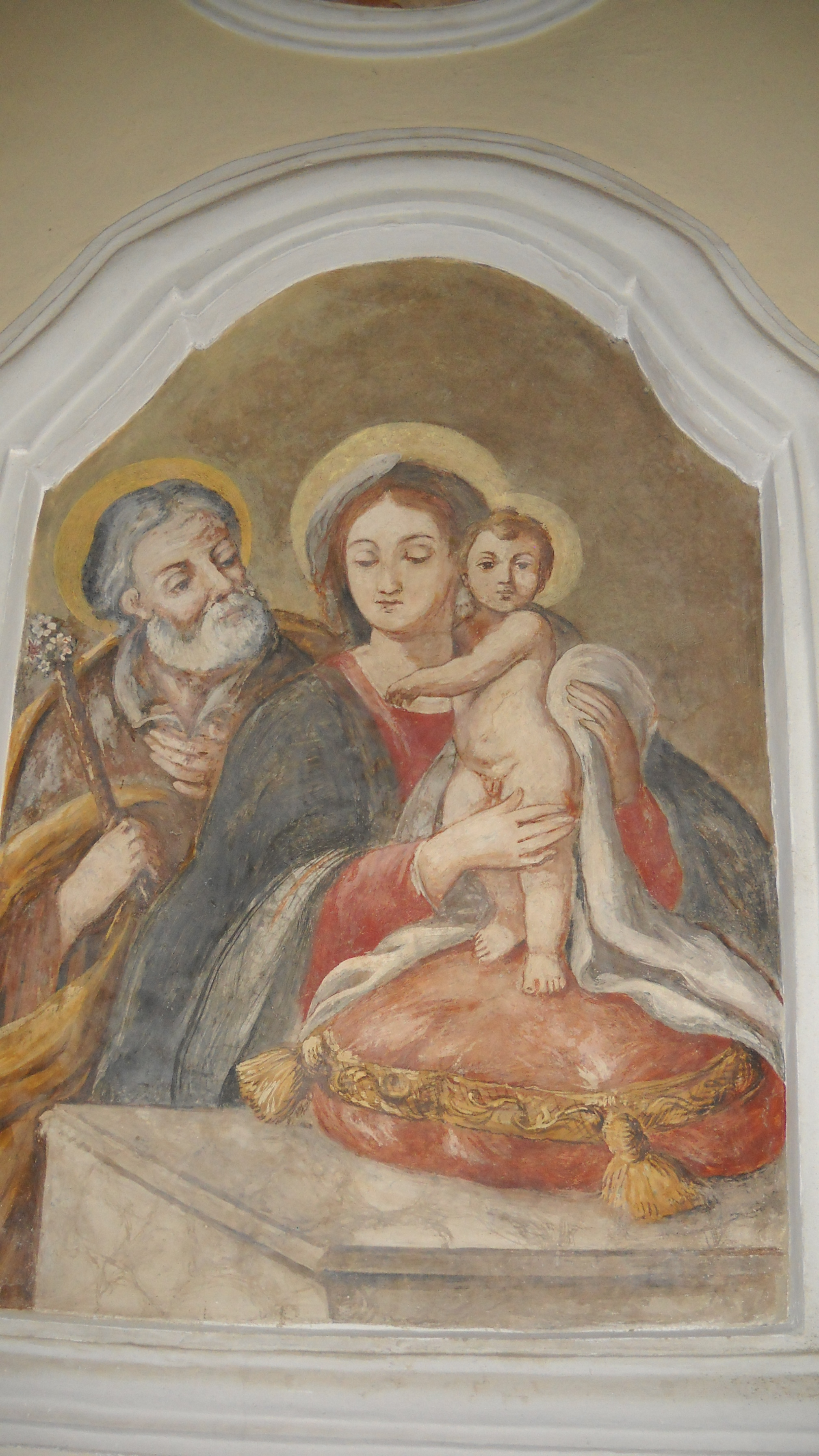 Affresco presente nella chiesa dei Santi giovanni e Paolo di Casale di Carinola